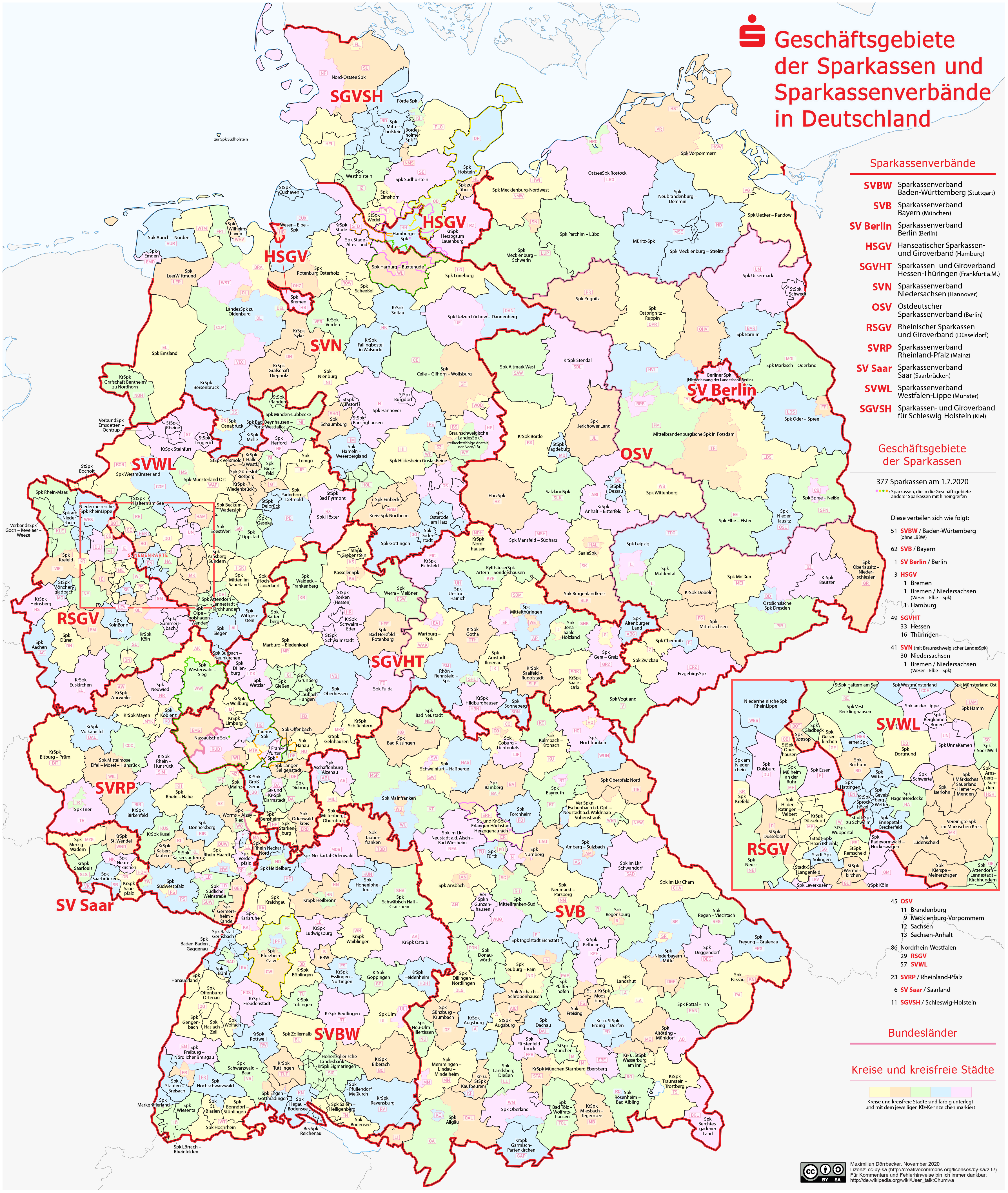 Geschäftsgebiete der Sparkassen und Sparkassenverbände in Deutschland (Karte)